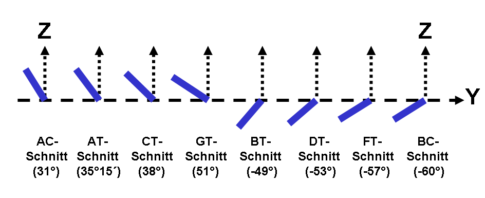 Lage von Schwingquarzschnitten im Quarzkristall